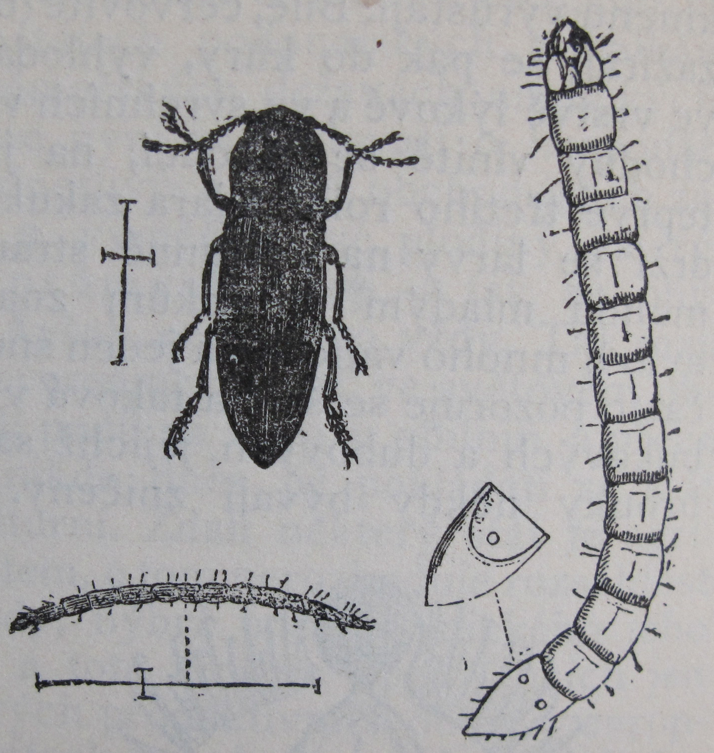 Původní popisek: Č. 106. Agriotes Esch. (Kovářík obilný).